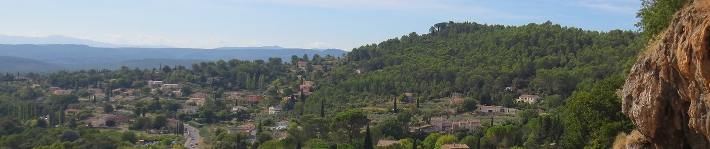 Vue panoramique de Cotignac